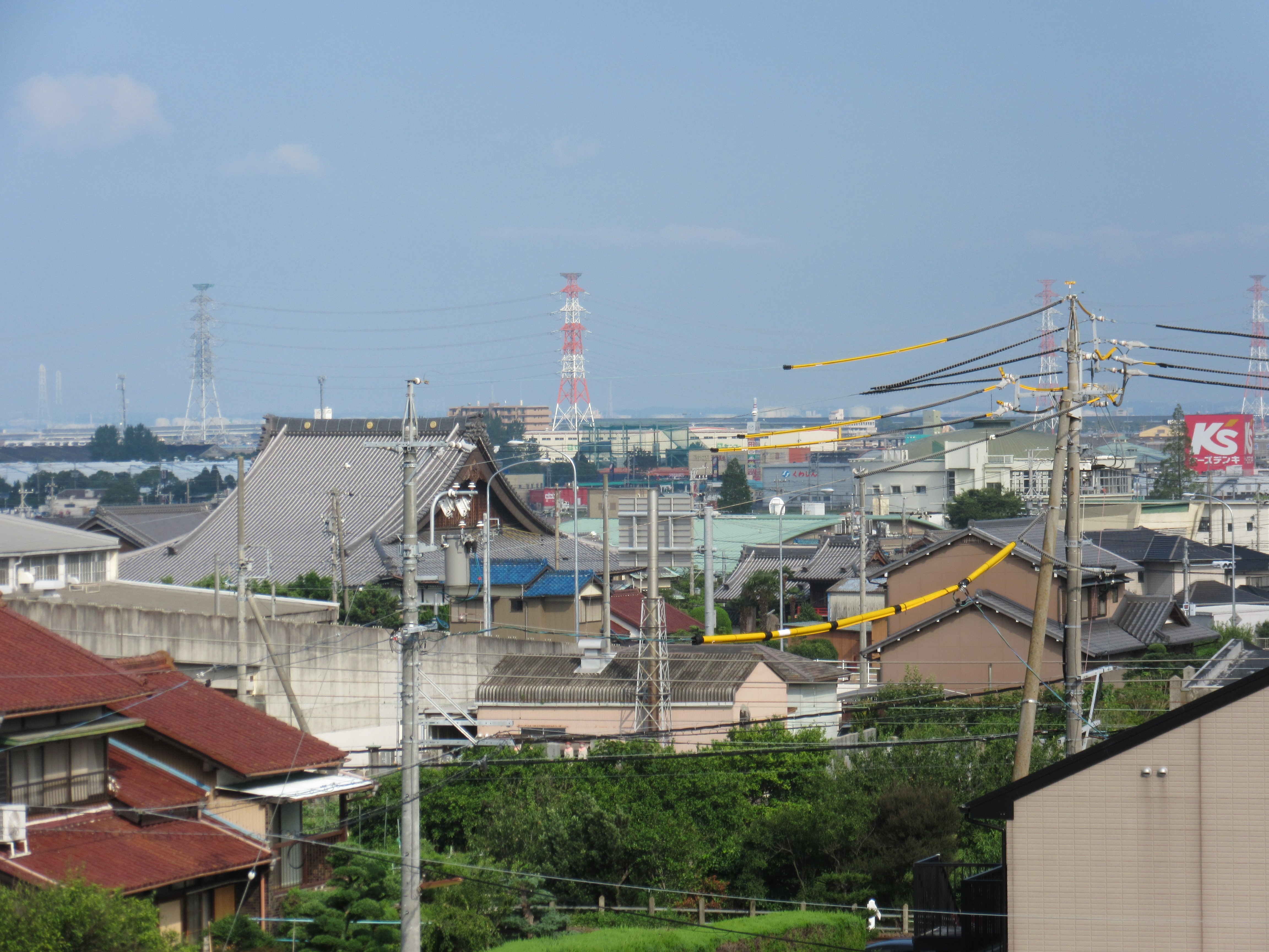 朝日町中心部（朝日町図書館より）